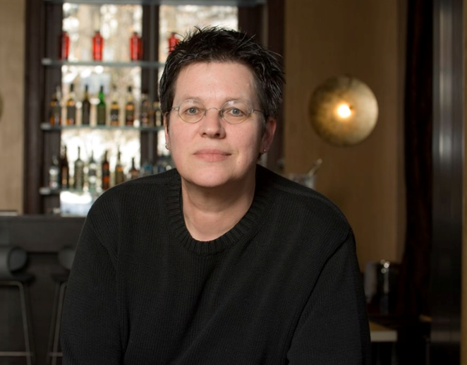 Drehbuchautorin / Screenwriter